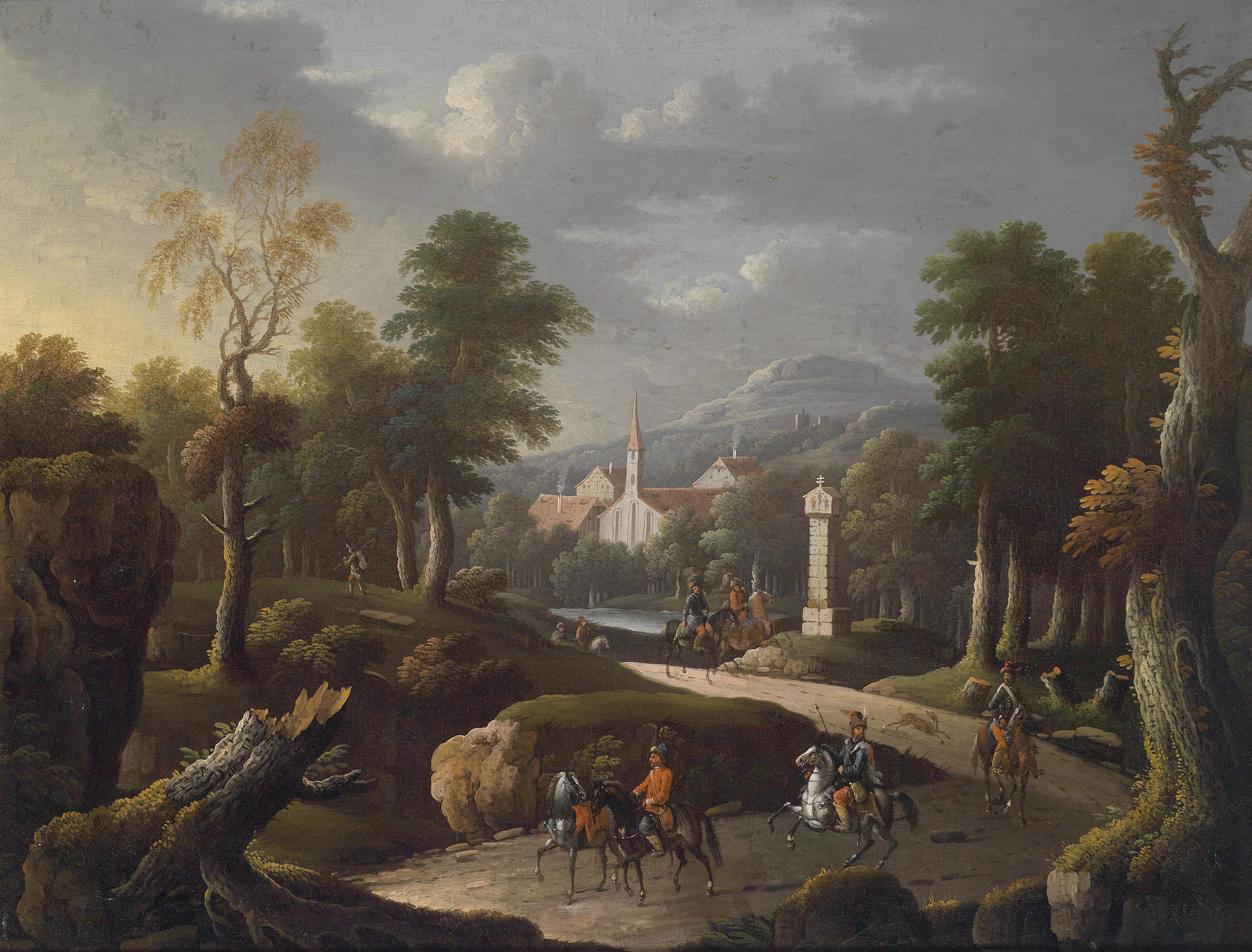 Bergige Landschaft mit Reisenden; rückseitig signiert und datiert: Georg von Bemmel 1703, Öl auf Leinwand, 49 x 63,5 cm